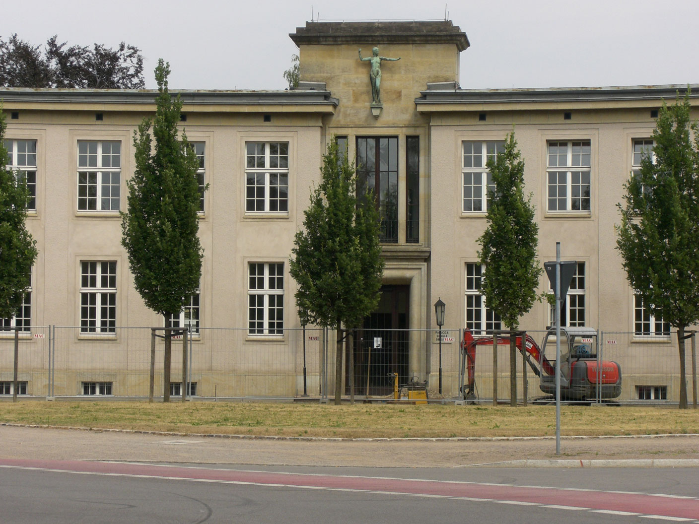 Die Palucca-Tanz-Schule in Dresden wird in den Sommerferien 2006 modernisiert